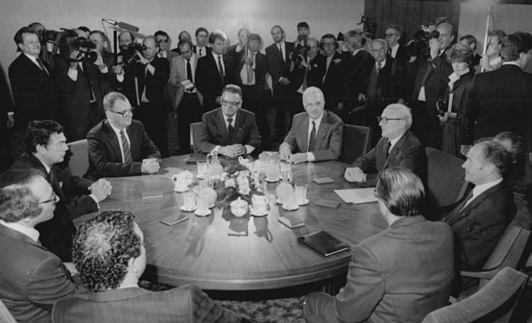 ADN-ZB-Zimmermann-17.10.88-Berlin: Bronfman-Besuch - Der Generalsekretär des ZK der SED und Vorsitzende des Staatsrates der DDR, Erich Honecker, empfing den Präsidenten des Jüdischen Weltkongresses, Edgar Miles Bronfman (2.v.l.), im Amtssitz des Staatsrates zu einem Gespräch. Daran nehmen u.a. teil: v. r. Oskar Fischer, Erich Honecker, Werner Jarowintzky, Dr. Peter Kirchner, Edgar Miles Bronfman, Prof. Dr. Israel Singer.